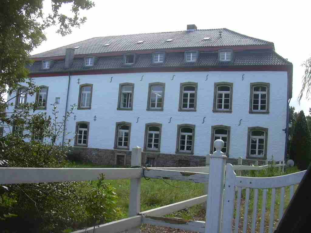 Das Herrenhaus Mozenborn bei Düren